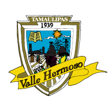 Escudo oficial de la Ciudad de Valle Hermoso, Tamaulipas, Mexico.